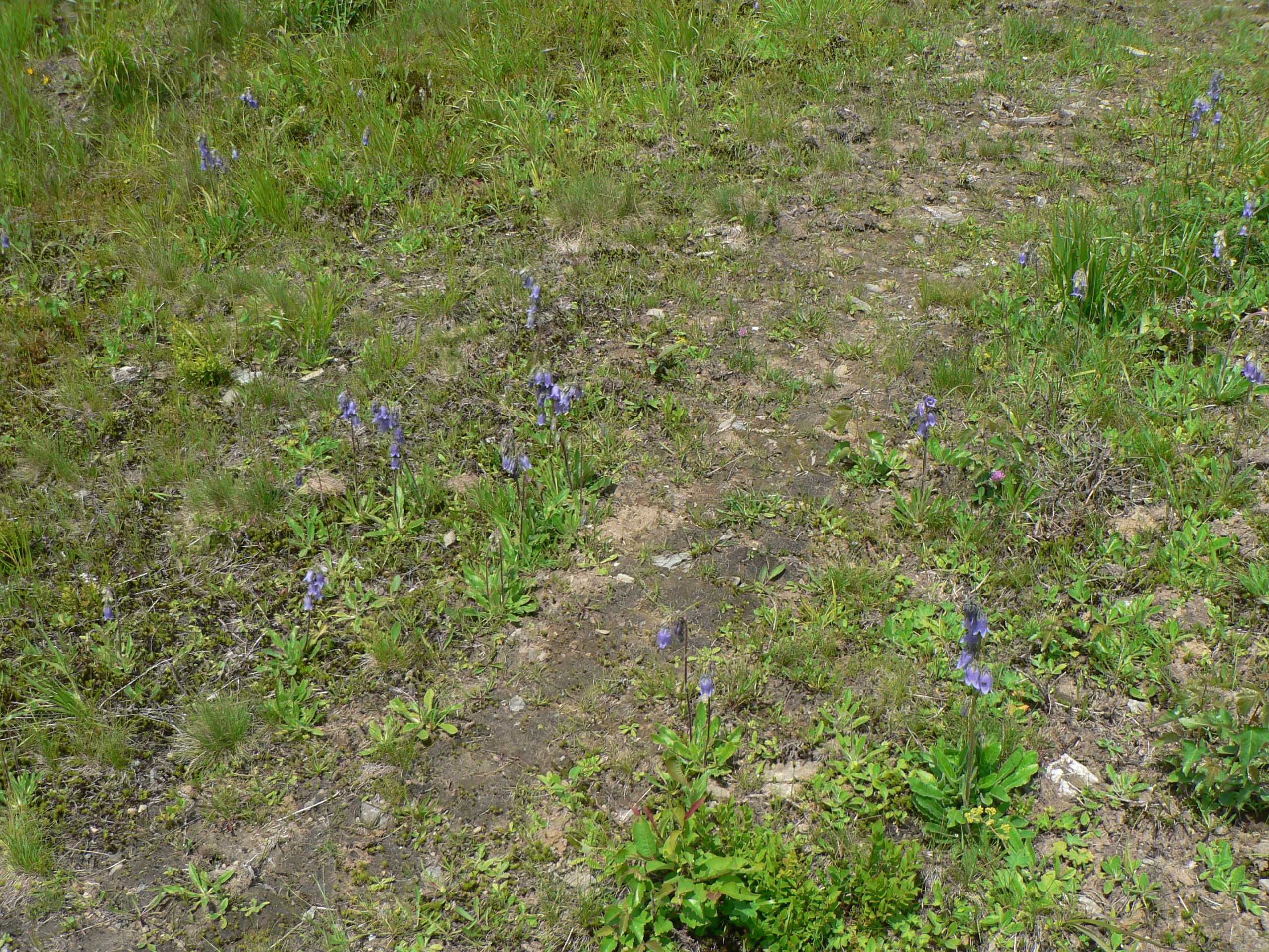 Zvonky vousaté (Campanula barbata), Červenohorské sedlo, Hrubý Jeseník